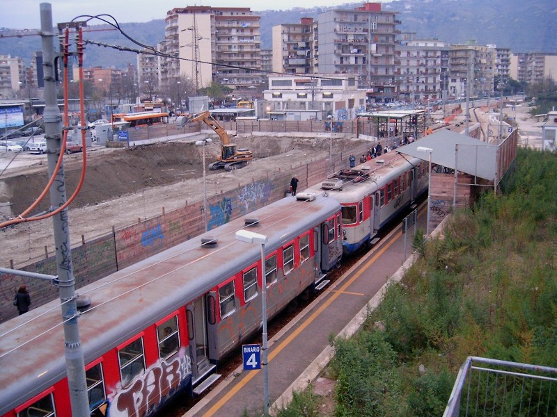 Lavoricumana_pianura